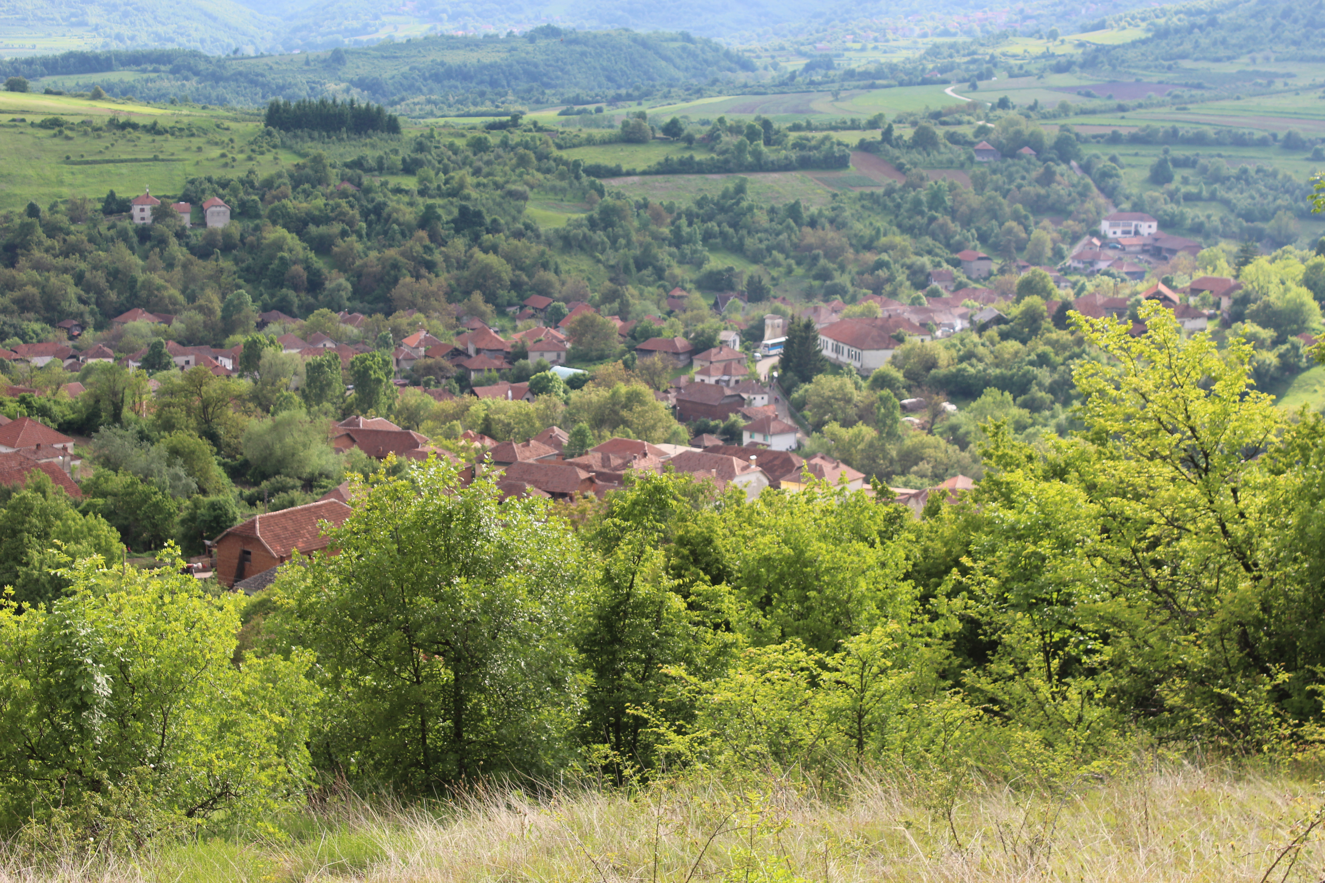 Srpski (latinica): Panorama sela Bučja.